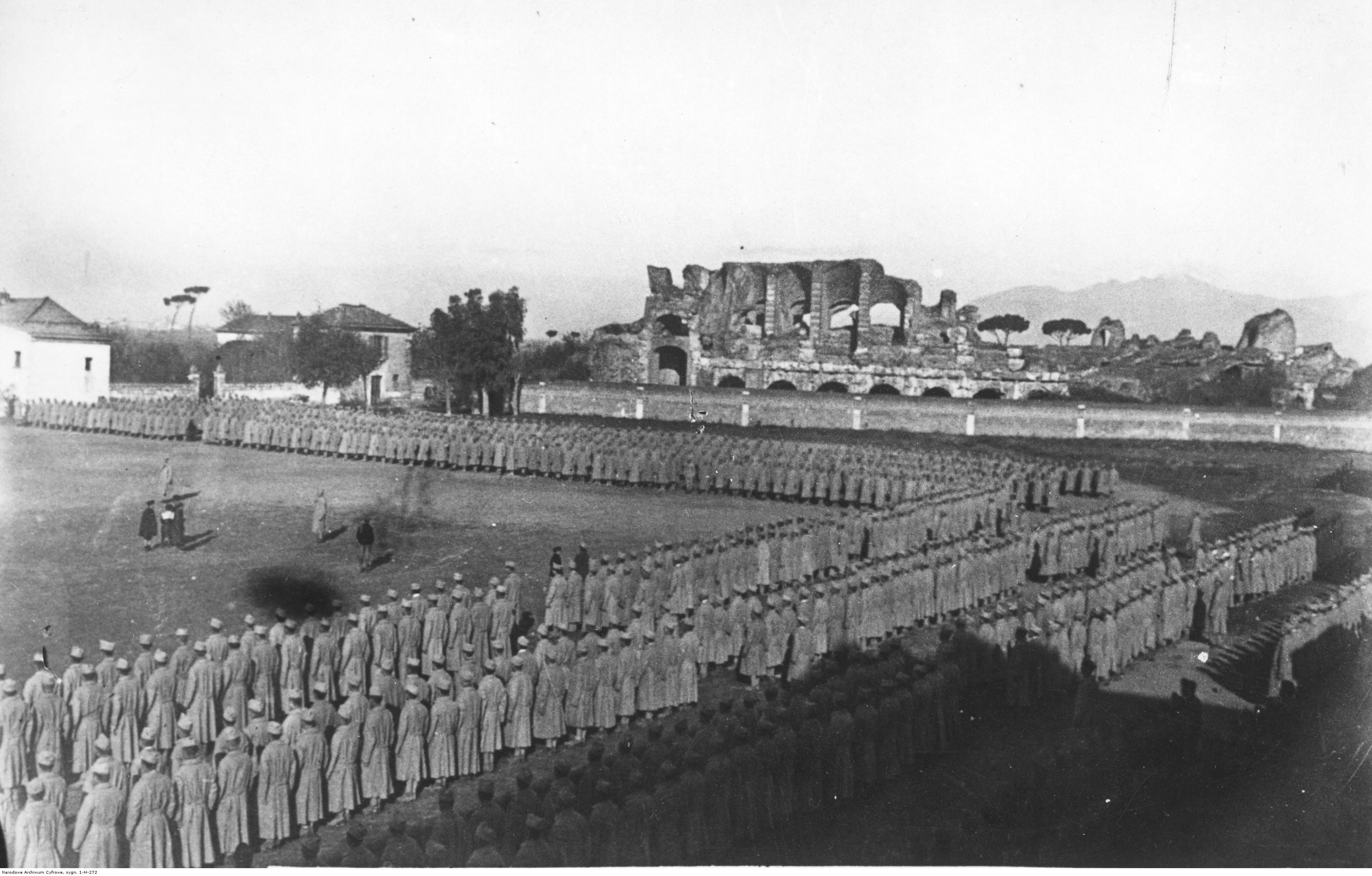 Polski obóz wojskowy we Włoszech. Przegląd pułku im. gen. J. H. Dąbrowskiego; 1918 r. Koncern Ilustrowany Kurier Codzienny - Archiwum Ilustracji. Sygnatura: 1-H-272